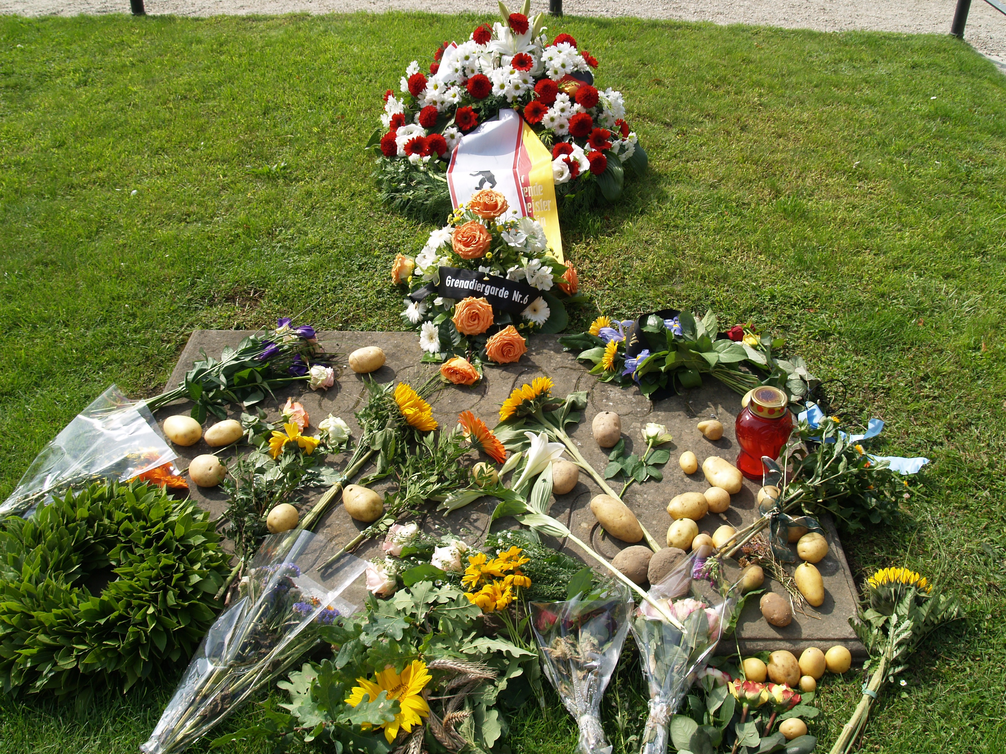 Tumbas de Federico II y de sus perros en Sanssouci.